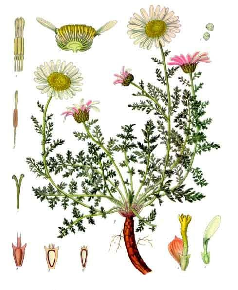 Mehrjähriger Bertram. A blühende Pflanze in natürl. Grösse; 1 Blüthenkorb im Längsschnitt, vergrössert; 2 Randblüthe, desgl.; 3 Scheibenblüthe mit Deckblatt, desgl.; 4 Staubgefässröhre, desgl.; 5 einzelnes Staubgefäss von innen, desgl.; 6 Pollen, desgl.; 7 Griffel mit Narben, desgl.; 8 eine Achäne der Scheibe, desgl.; 9 dieselbe in der Richtung der breiten Fläche längs durchschnitten, desgl.; 10 dieselbe in der Richtung der schmalen Fläche durchschnitten, desgl.